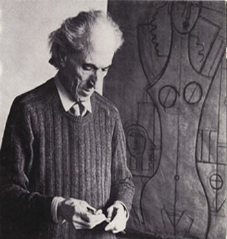 Mario Tozzi nel suo studio a Parigi, 1976.